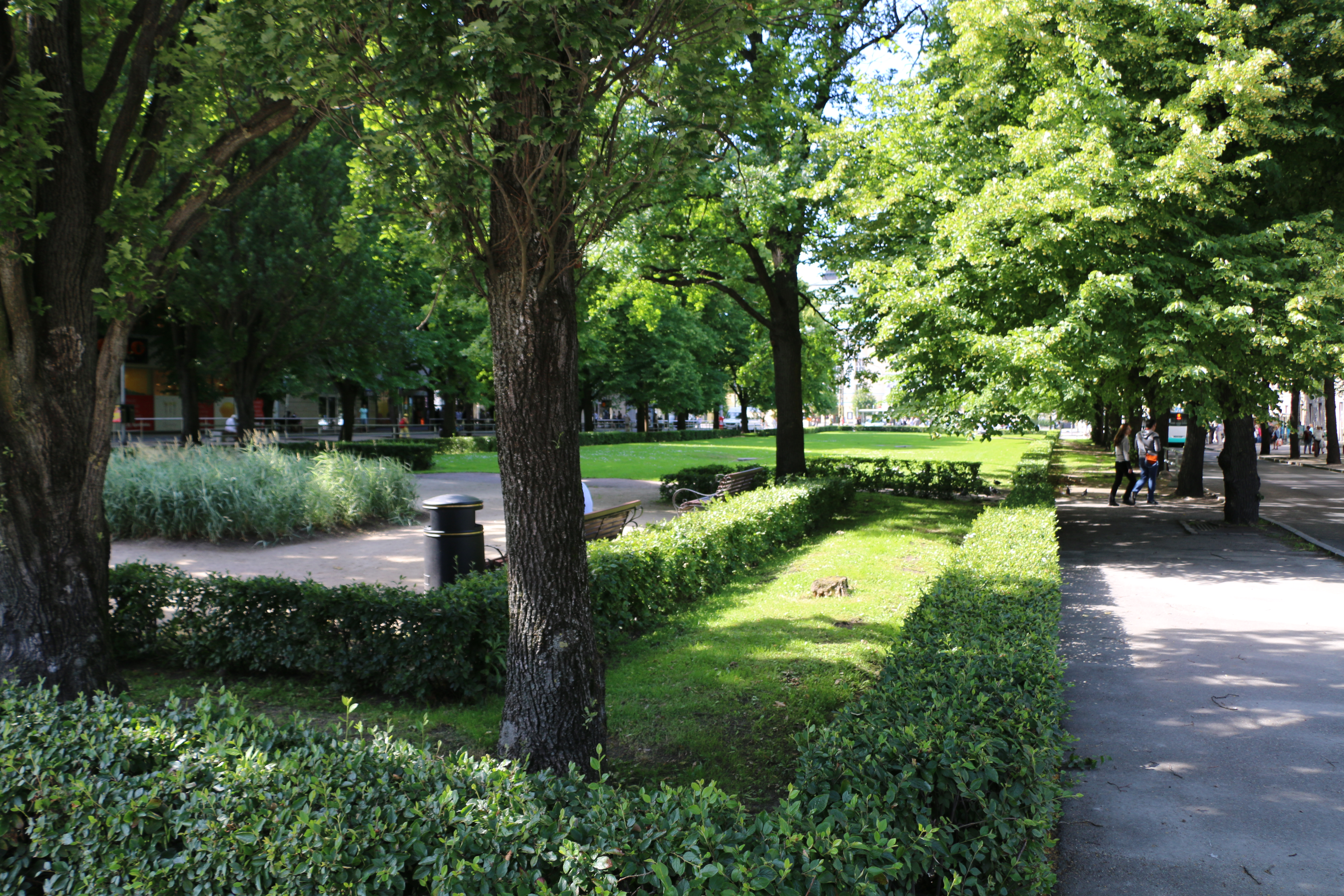 Teatri väljak Islandi väljaku poolt, lähedalt